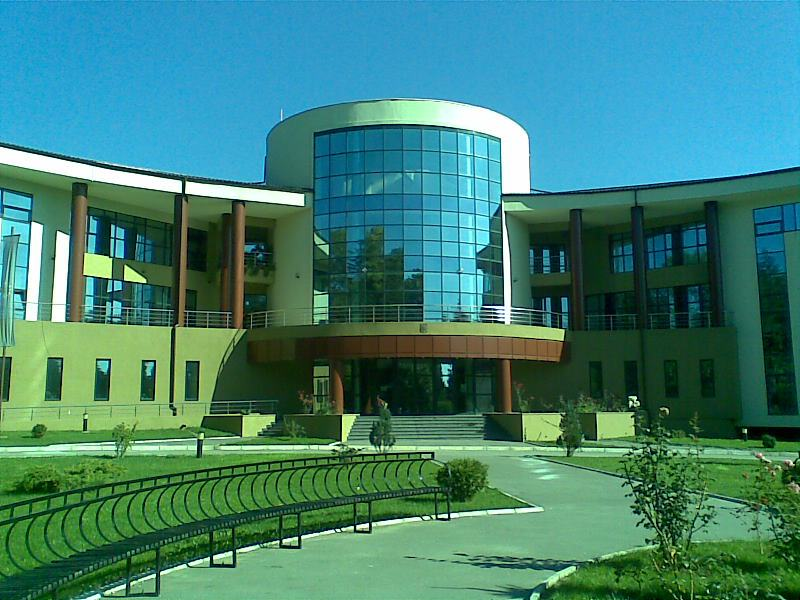 Primăria oraşului Breaza, Prahova, România